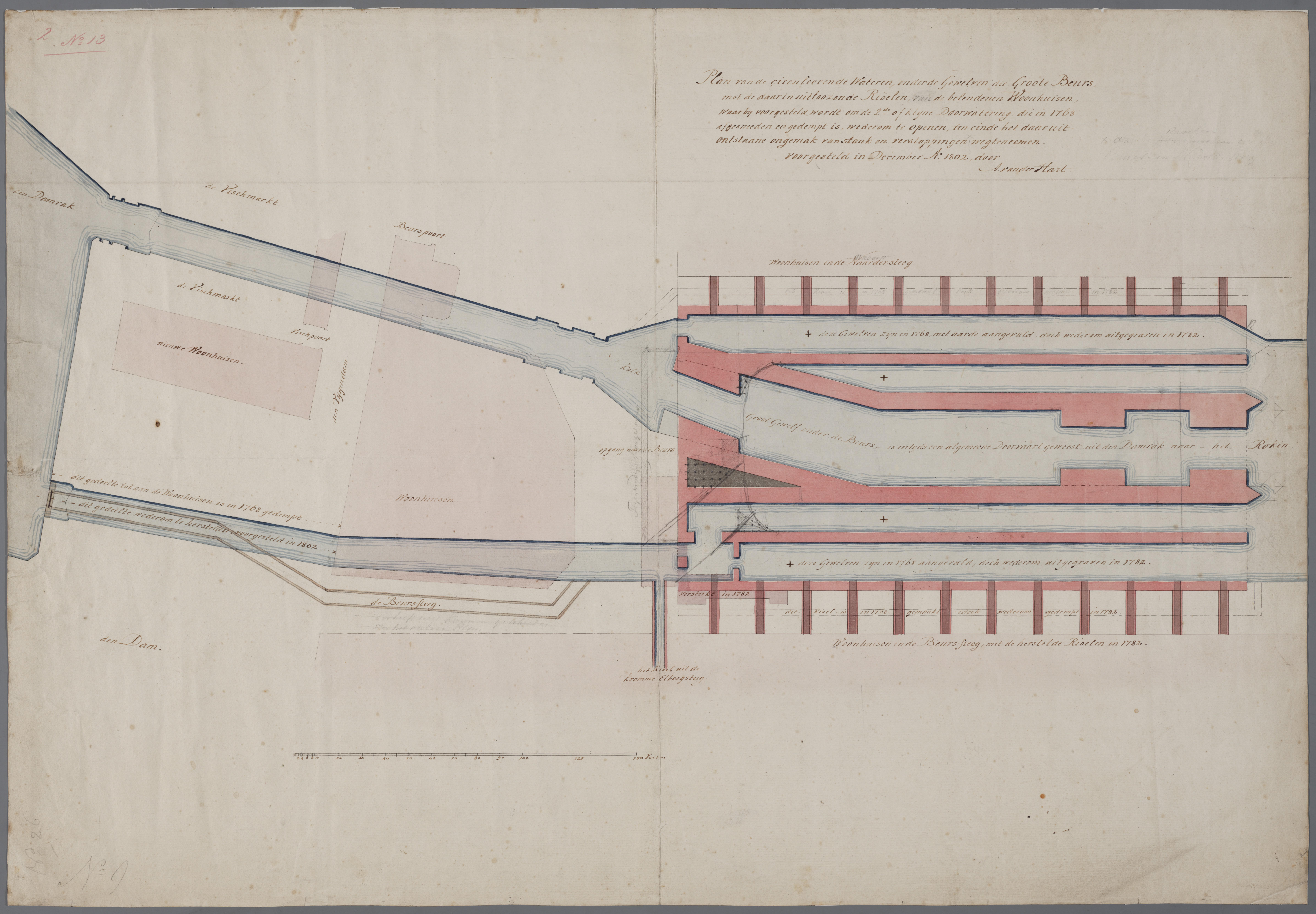 Situatieschets van de wateren onder de beurs en de voor 1803 gedempte gedeelten. Amsterdam, Stadsarchief Amsterdam (B00000024083, v/h 010056917805).